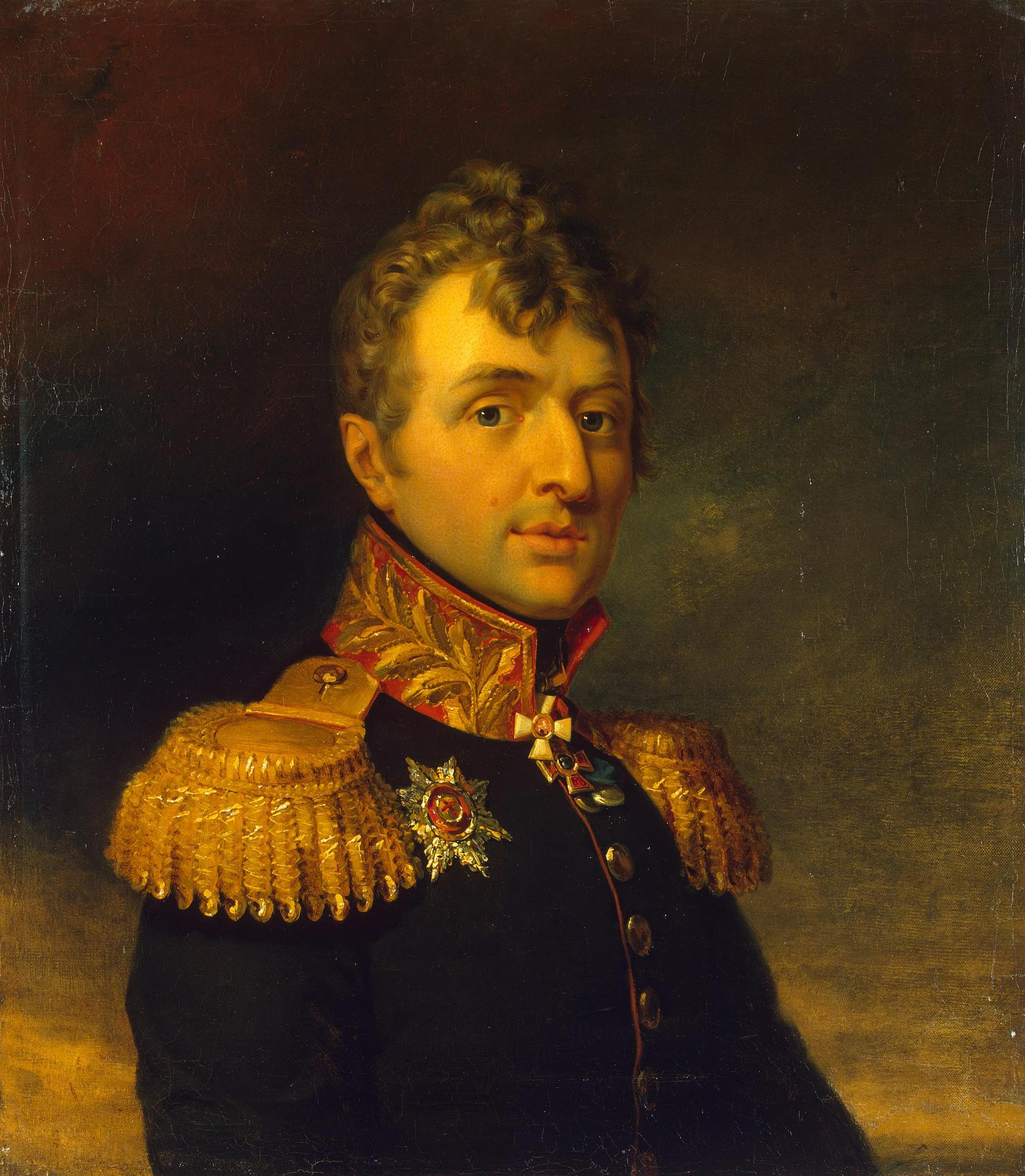 Ivan Vasilyevich Mantejfel (10.06.1771 – 09.10.1813) russian general